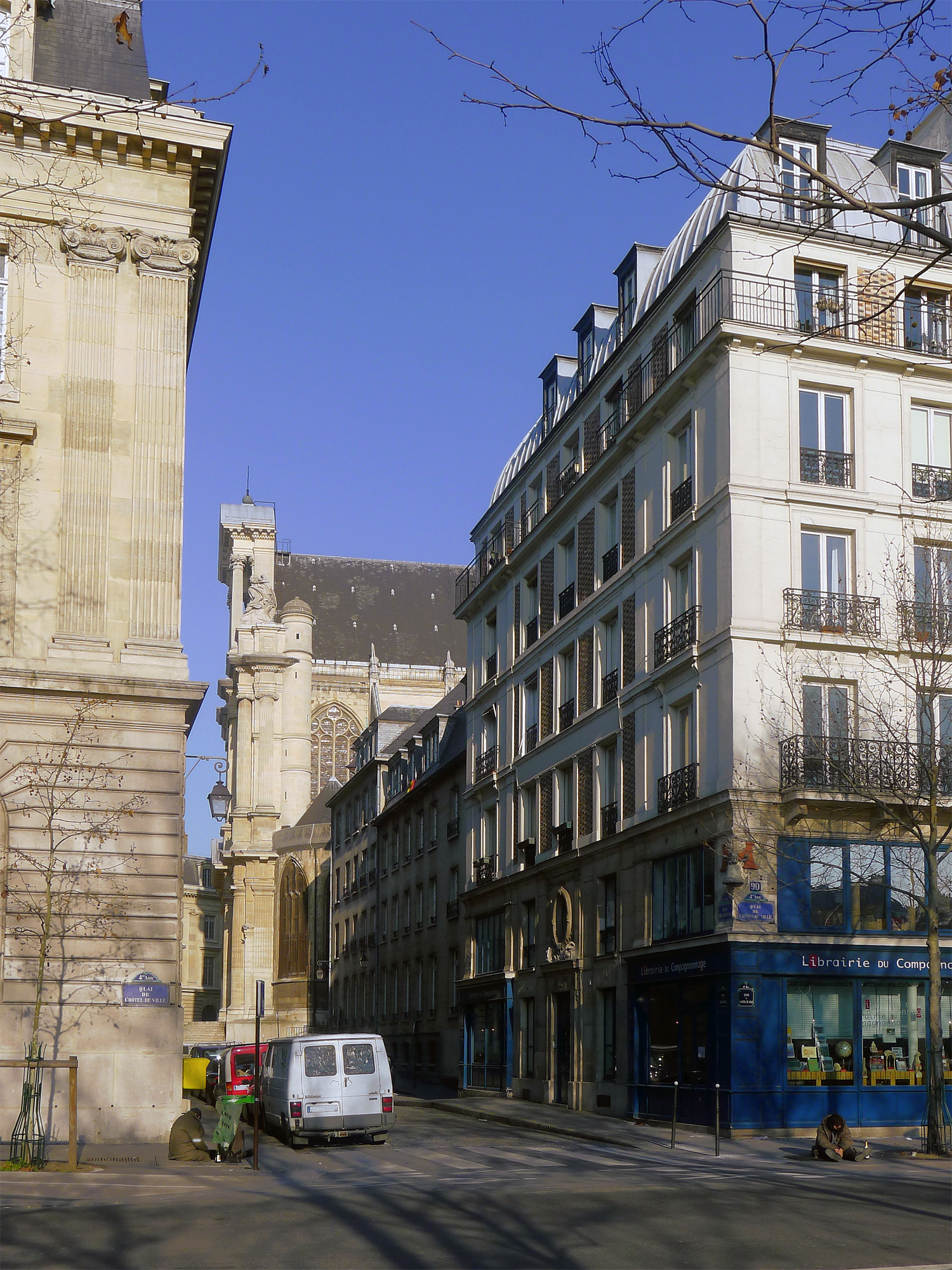 Rue de Brosse et quai de l'Hôtel de Ville - Paris IV